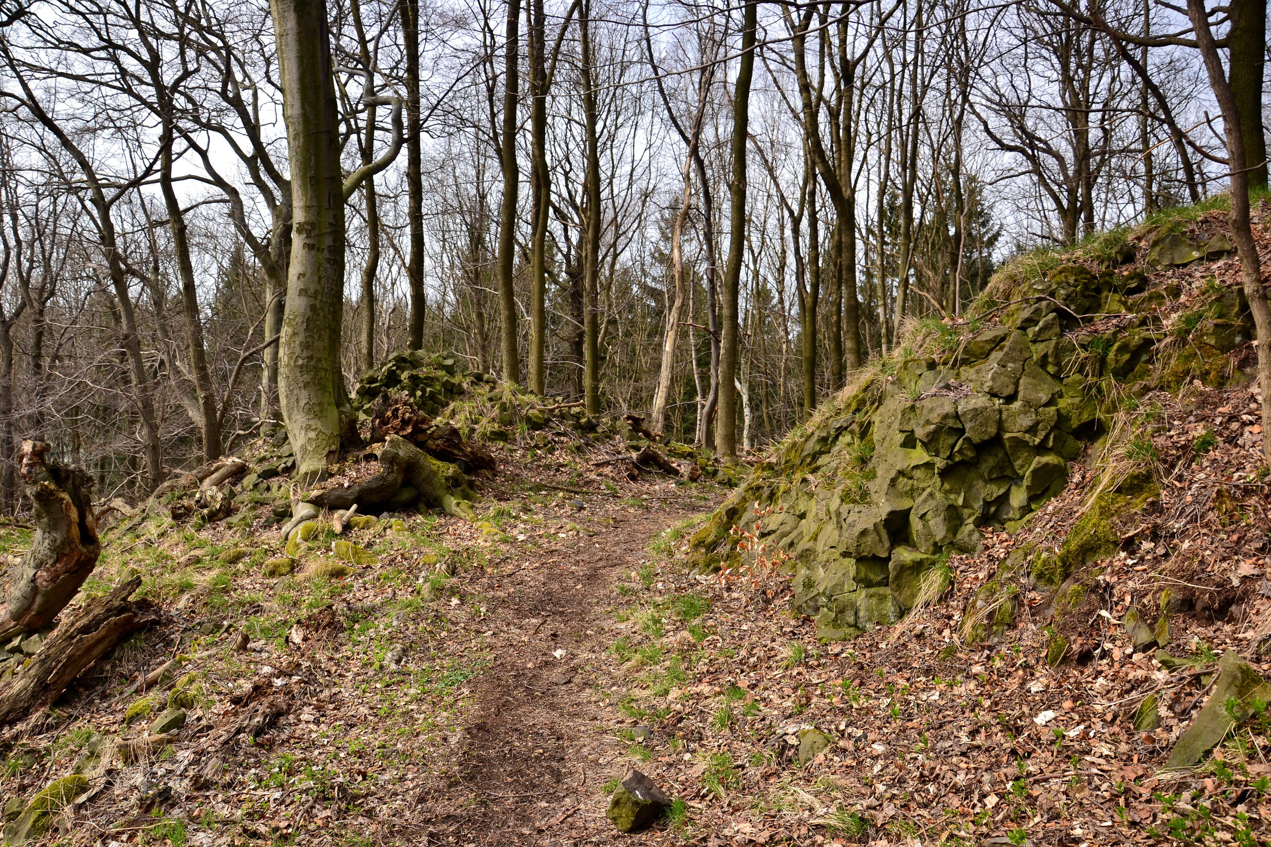 Druhá brána, Hrad Panna, pp. 386, Řepčice (Třebušín).